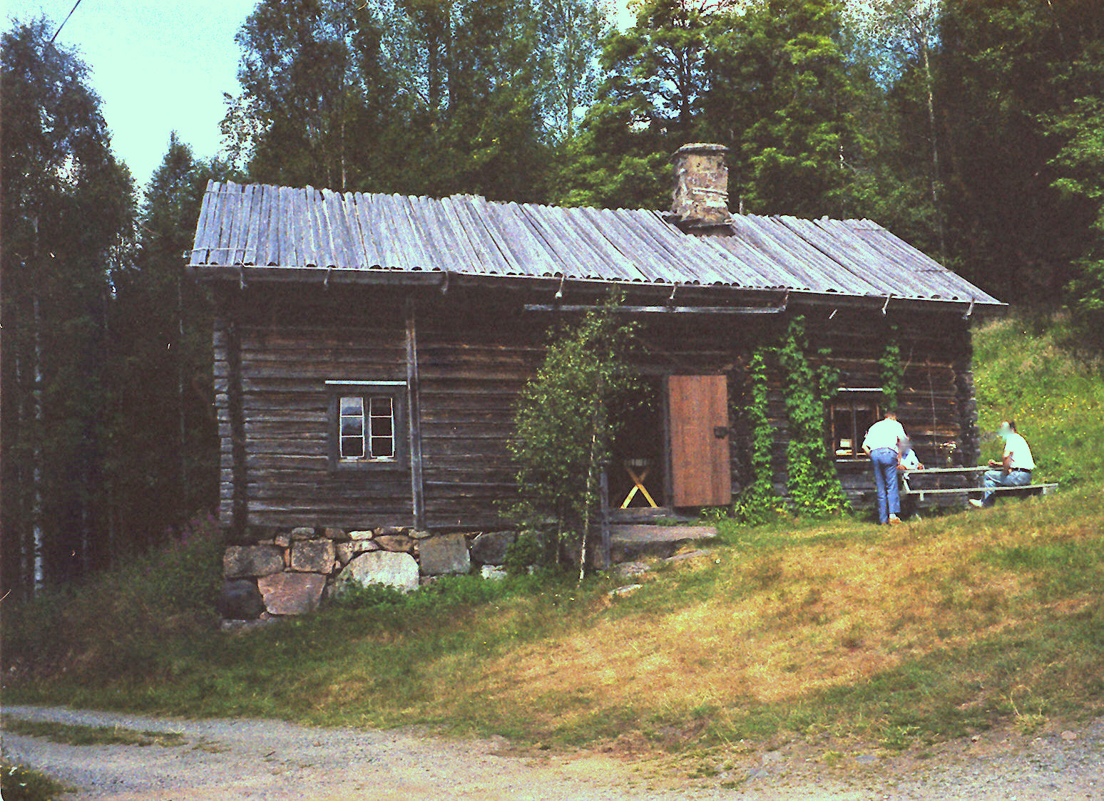 Rikenbergets rökstuga, Södra Finnskoga socken.